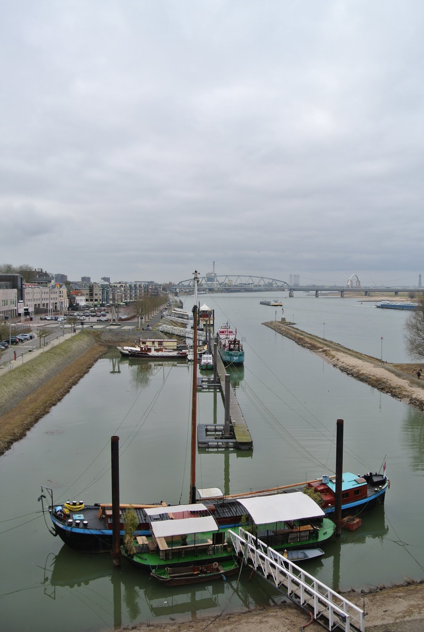 Lindenberghaven, Nijmegen, Netherlands